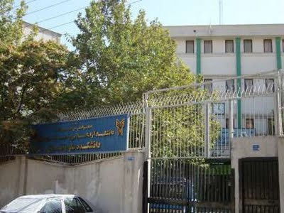 دانشکده مهندسی صنایع تهران جنوب